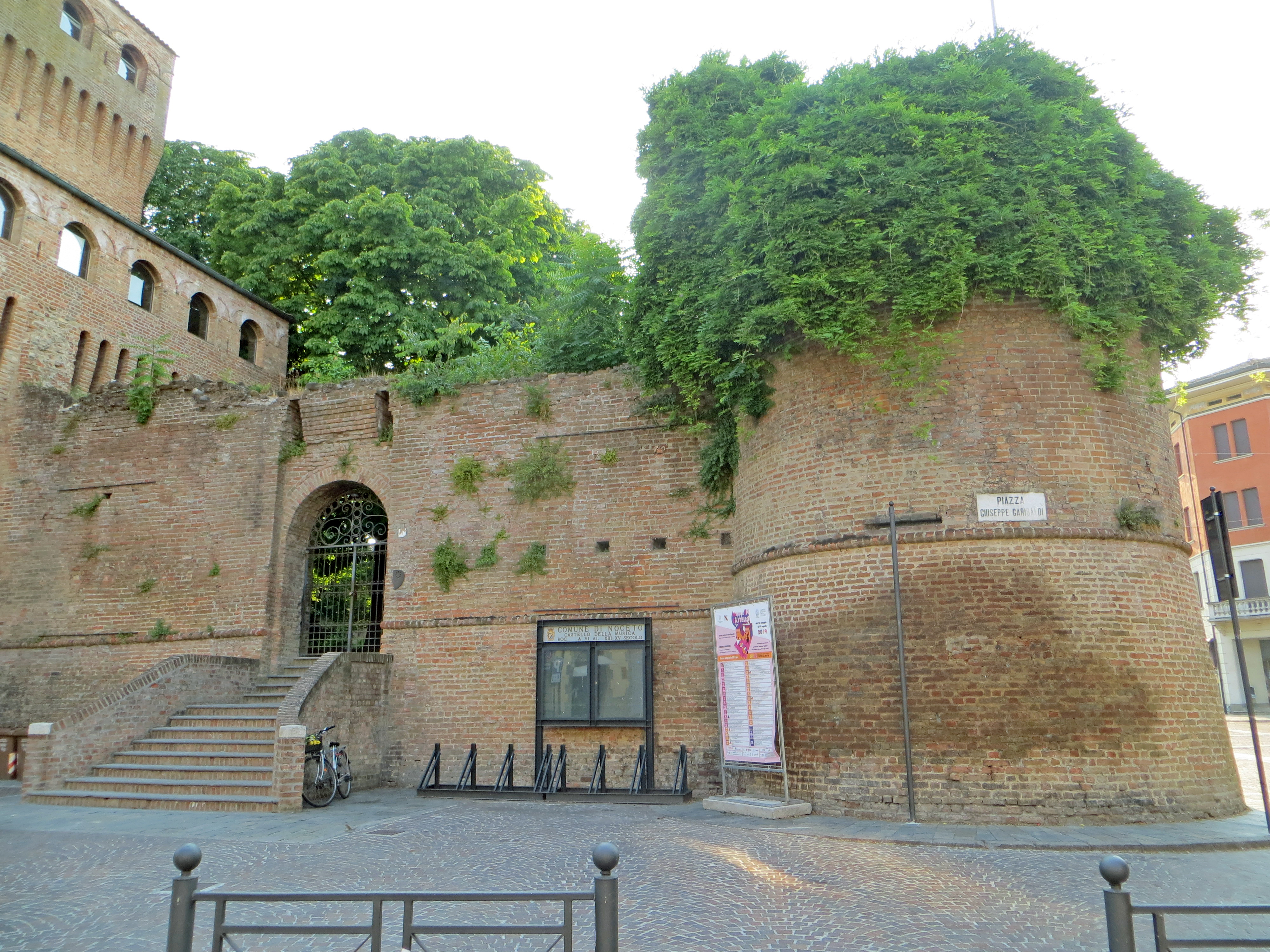 Rocca dei Sanvitale (Noceto) - ingresso e torre angolare nord-est